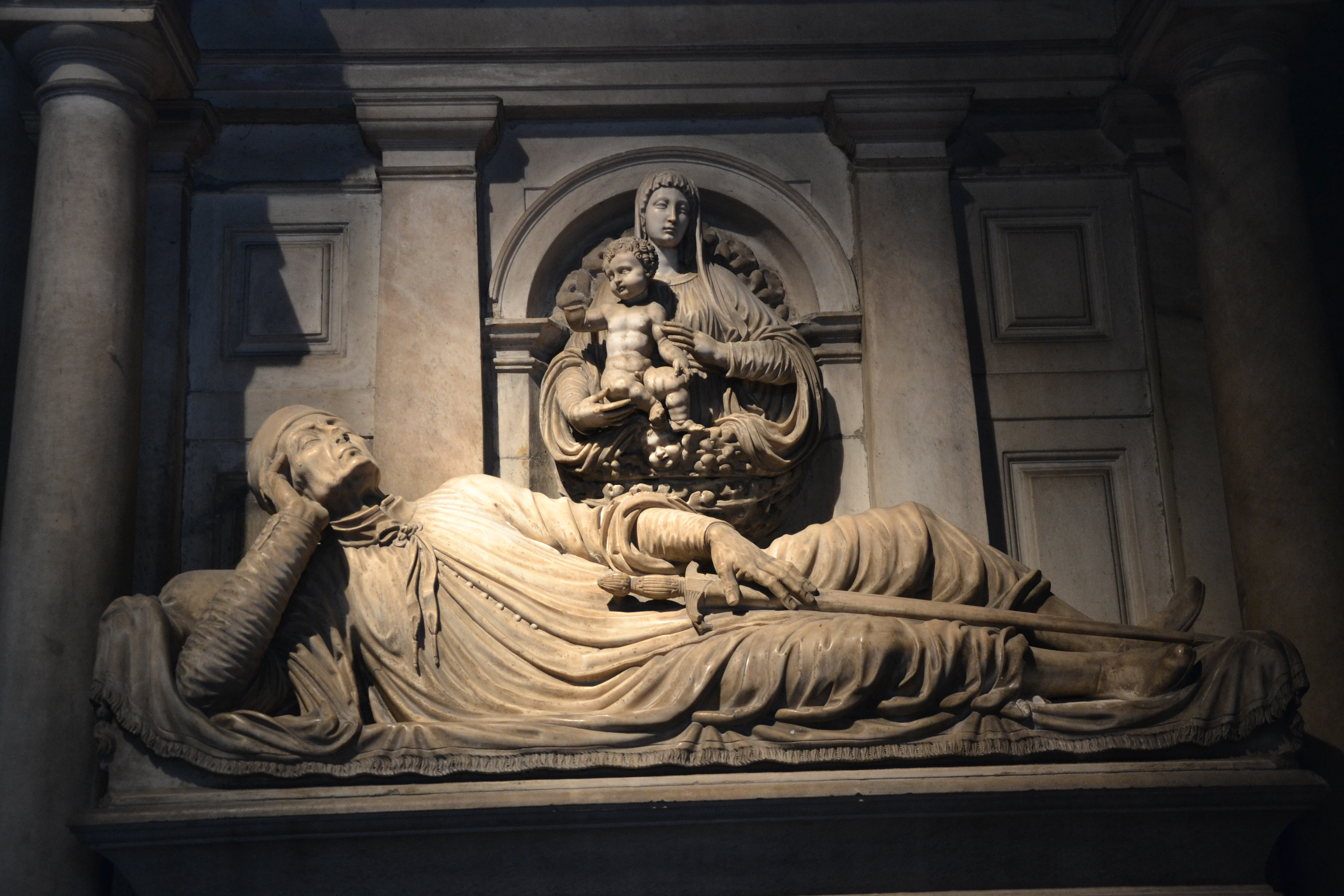 tomba di Giovanni del Conte, scolpita da Marco d'Agrate e Vincenzo Seregni (1568), Milano, Basilica di San Lorenzo alle colonne